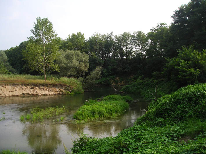 Torrente Terdoppio, Dorno, Italy, meandro